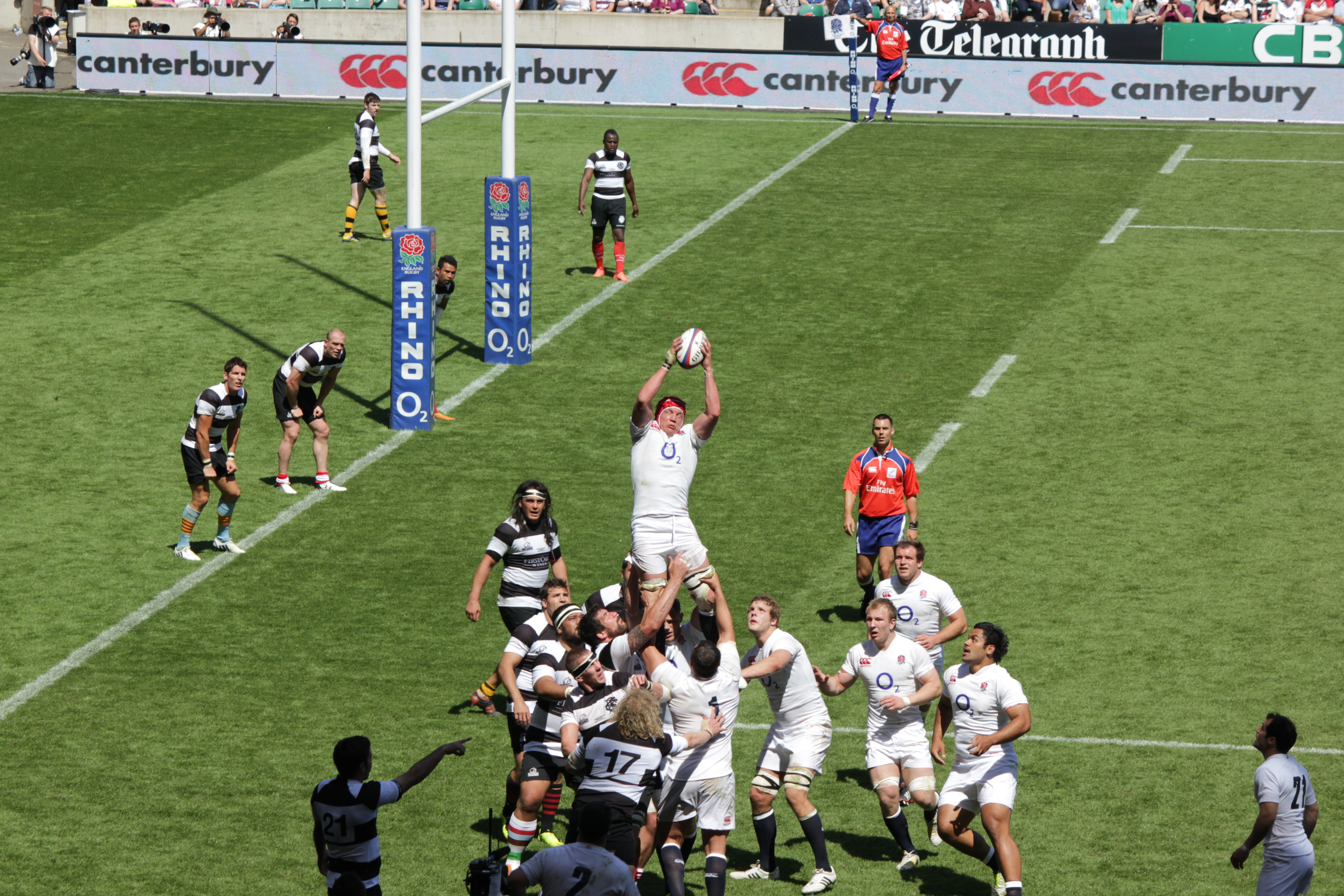 England v Barbarian 2013